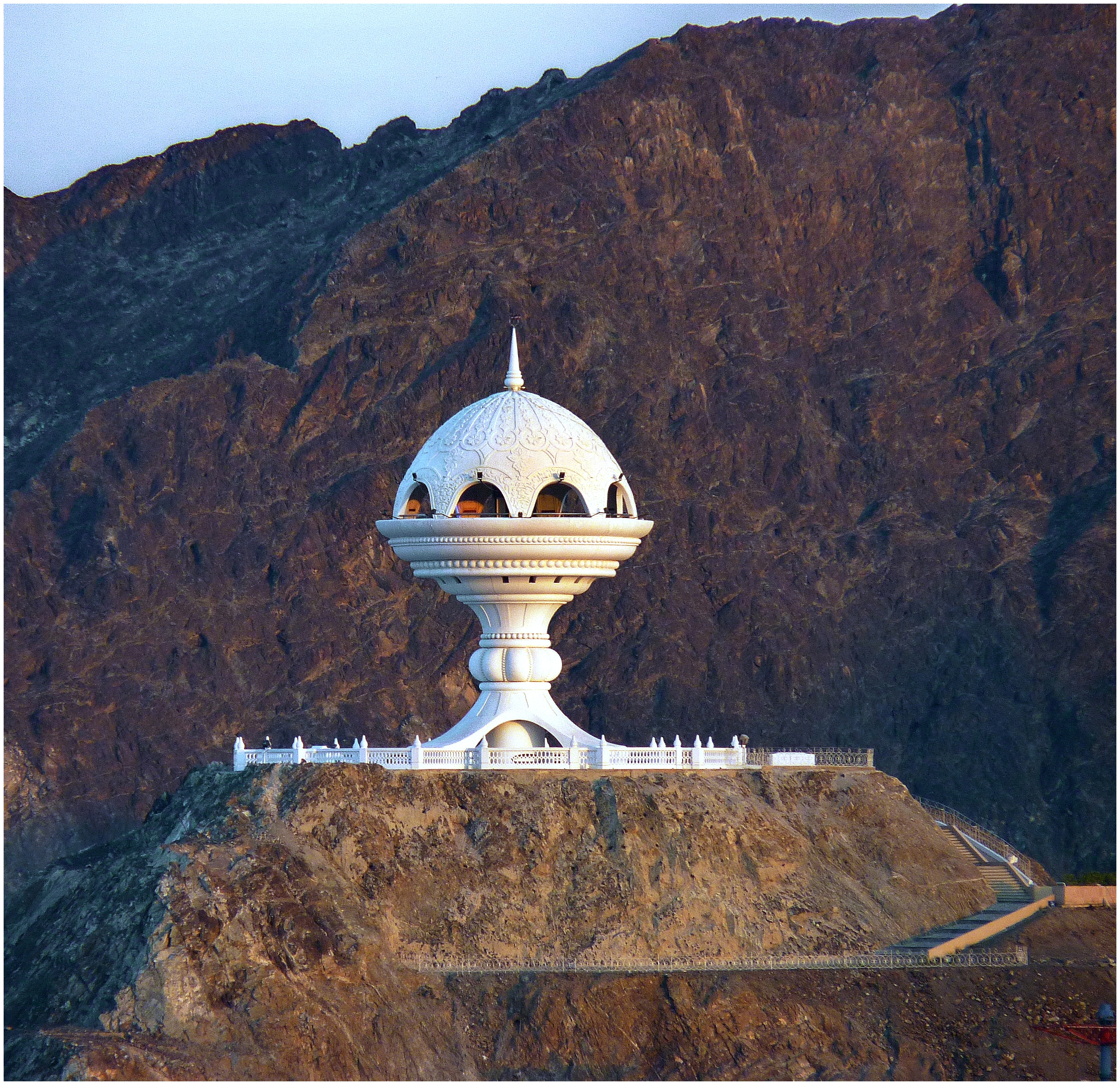 Original Riyam Monument, Muscat